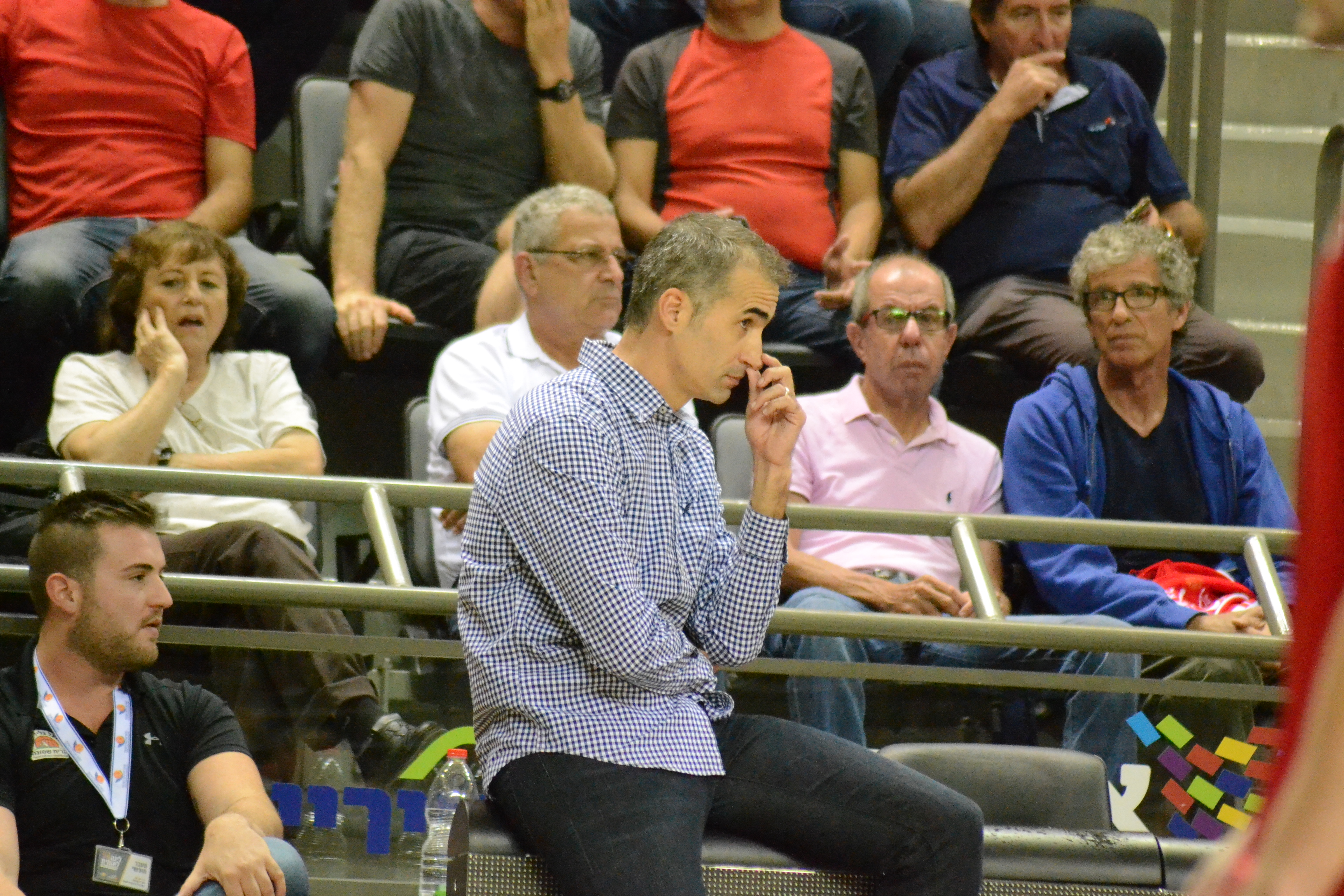 אבישי גורדון בתפקיד מאמן גליל עליון 2017